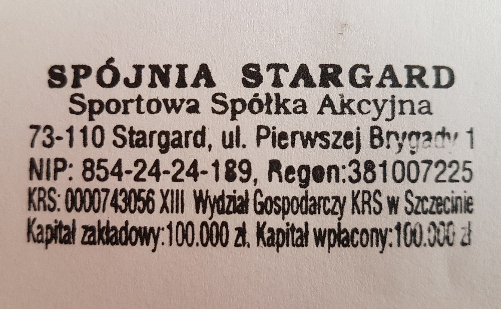 Pieczątka Spójni Stargard - SSA